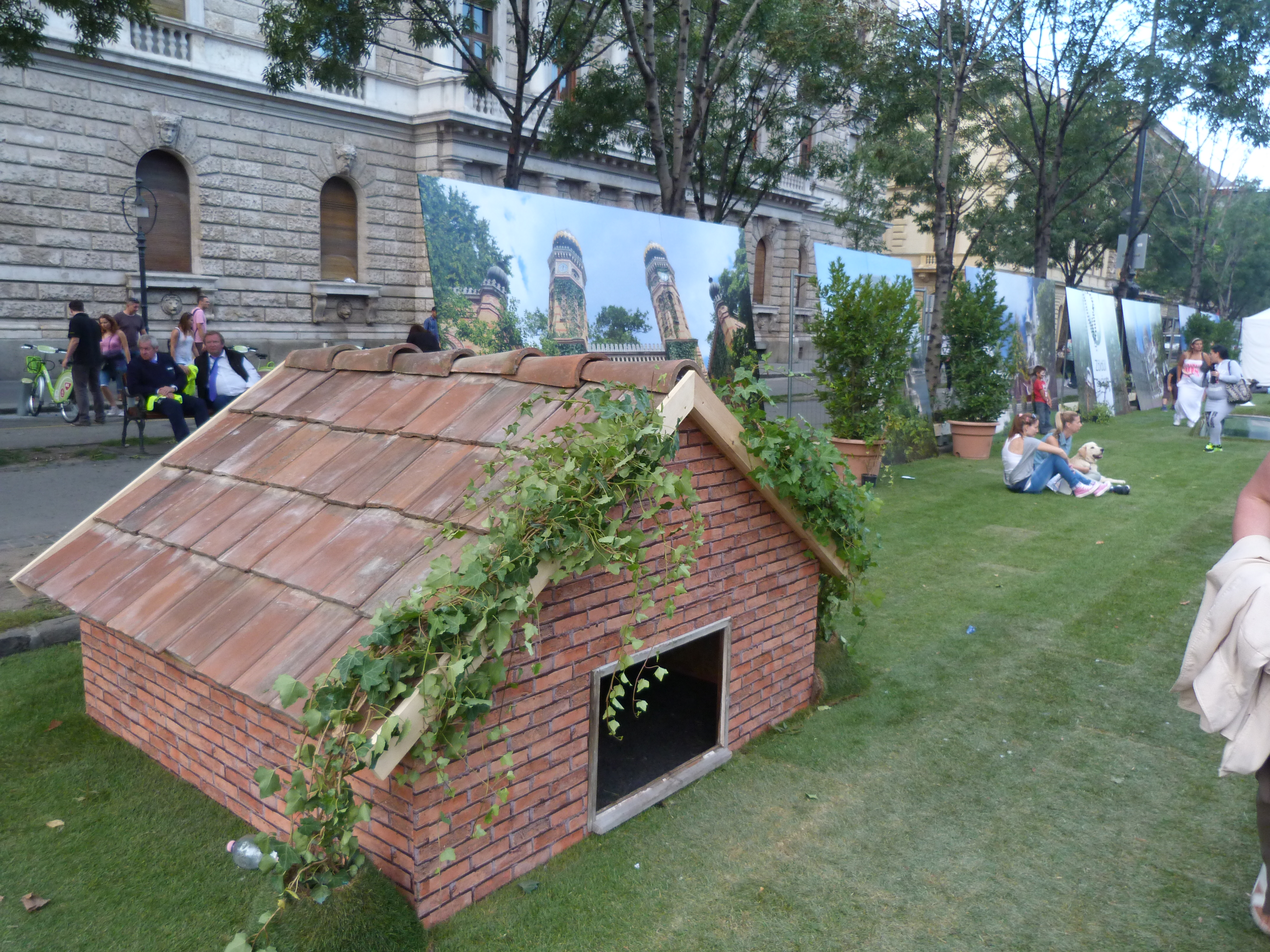 A felvétel 2014. szeptember 21-én vasárnap készült Budapesten, az Andrássy úton. Autómentes Nap. ©© Derzsi Elekes Andor, Budapest, 2014, A kép egészben, vagy részletekben másolását, bármilyen úton történő sokszorosítását és felhasználását a szerző ellenérték nélkül, jogutódjaira is kihatóan megengedi. Az engedély kiterjed a kereskedelmi célú hasznosításra is. Kéri azonban nevének feltüntetését a felhasználás során. A Metapolisz sorozat valamennyi képe és filmje Creative Commons alatti valamint kereskedelmi - for profit - célra is felhasználható. Ajánlott hivatkozás: Derzsi Elekes Andor: Metapolisz DVD line